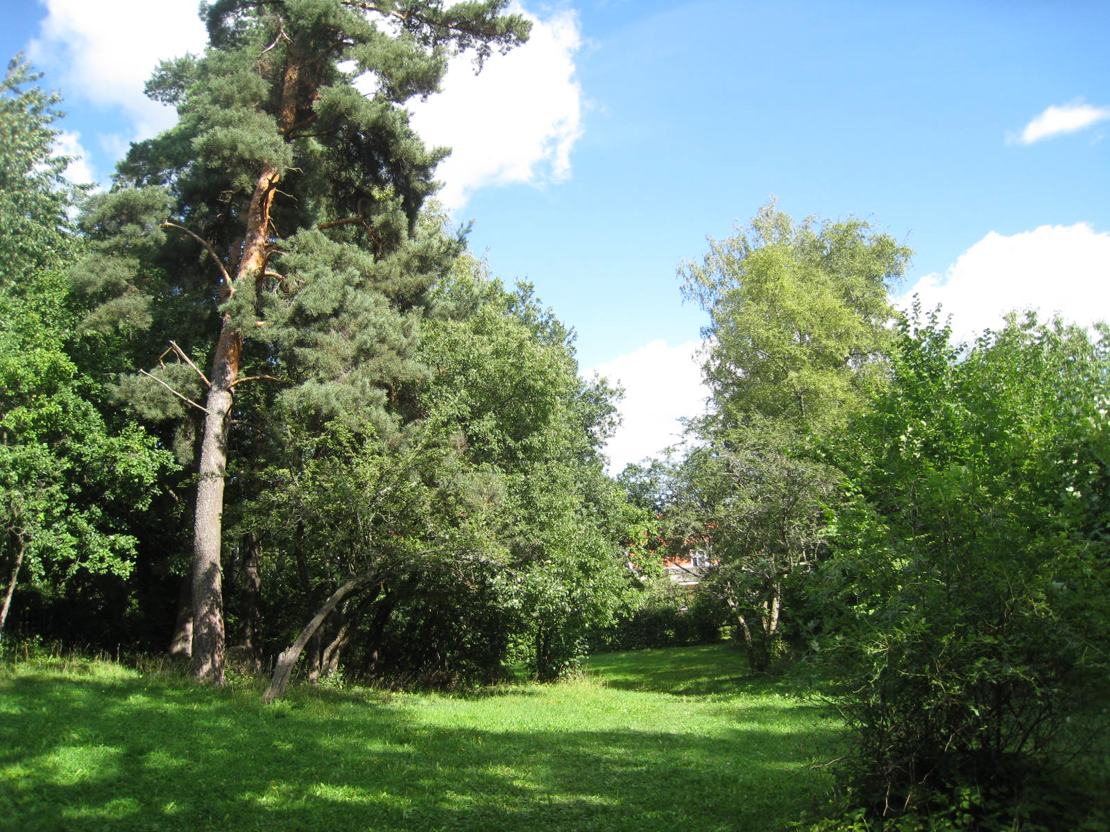 Bergviksdälden ligger parallellt med Alviksvägen i Smedslätten. Dälden är en mindre dalgång eller sänka med grönskande växtlighet och den ligger mellan Bergviksvägen och Önskeringsvägen samt mellan kvarteren Törnrosa och Pepparkakshäxan.